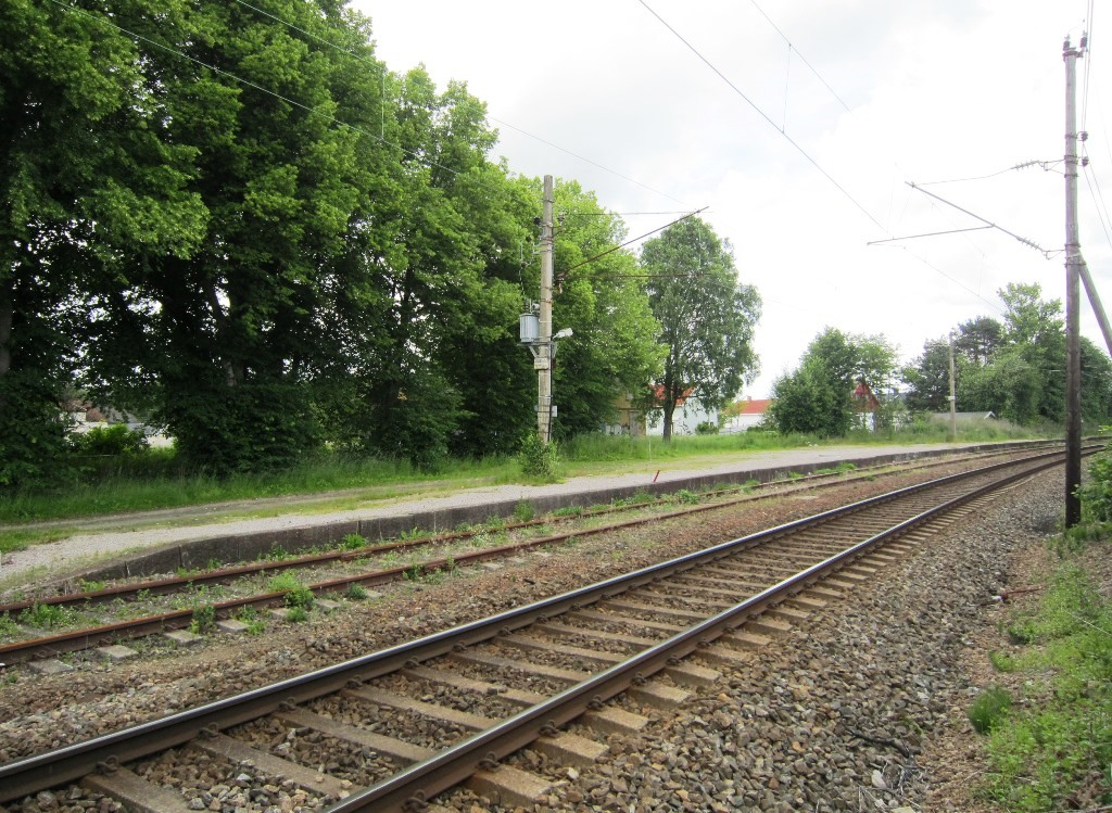 Lisleby stasjon på Østfoldbanen